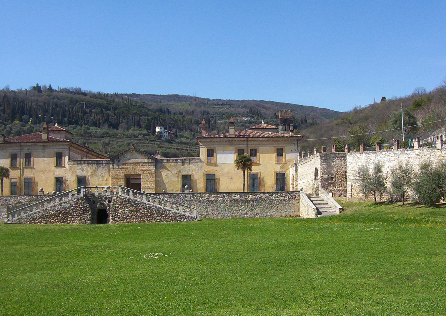 Villa della Torre a Fumane (provincia di Verona)